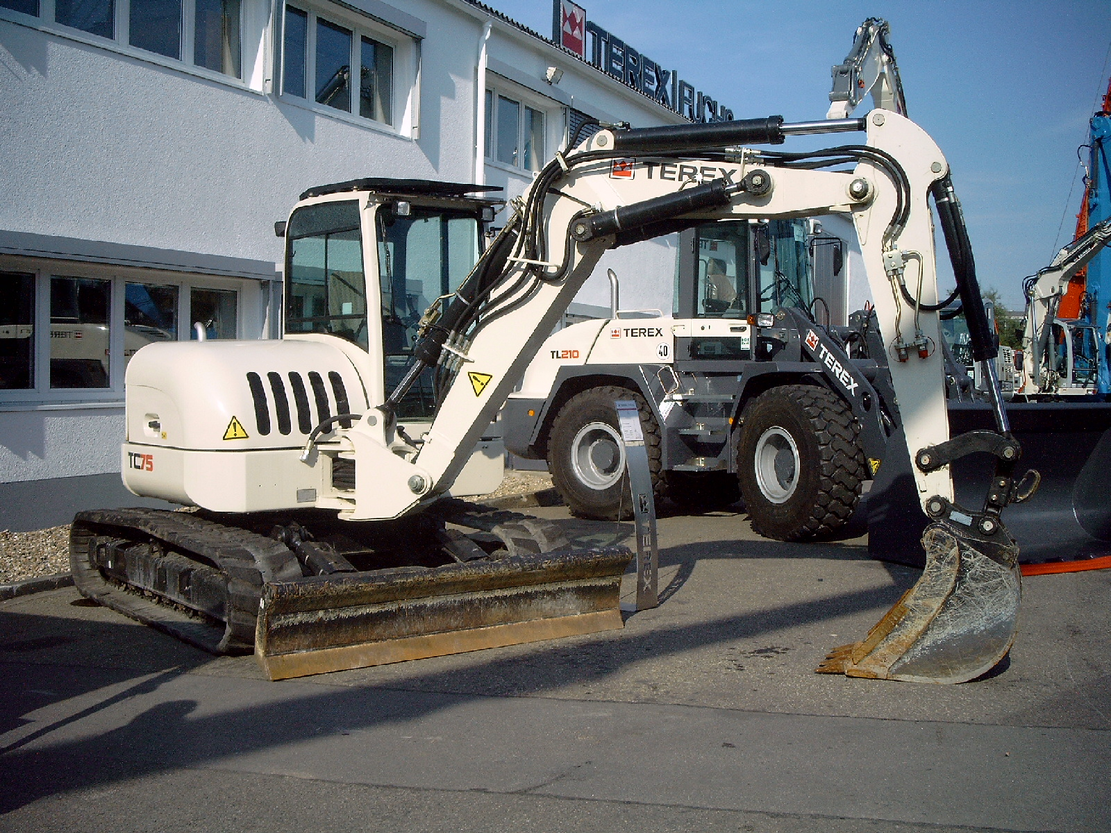 Terex TC 75 beim Tag der Offenen Tür zum 50. Jubiläum des Baggerherstellers Terex-Fuchs in Bad Schönborn